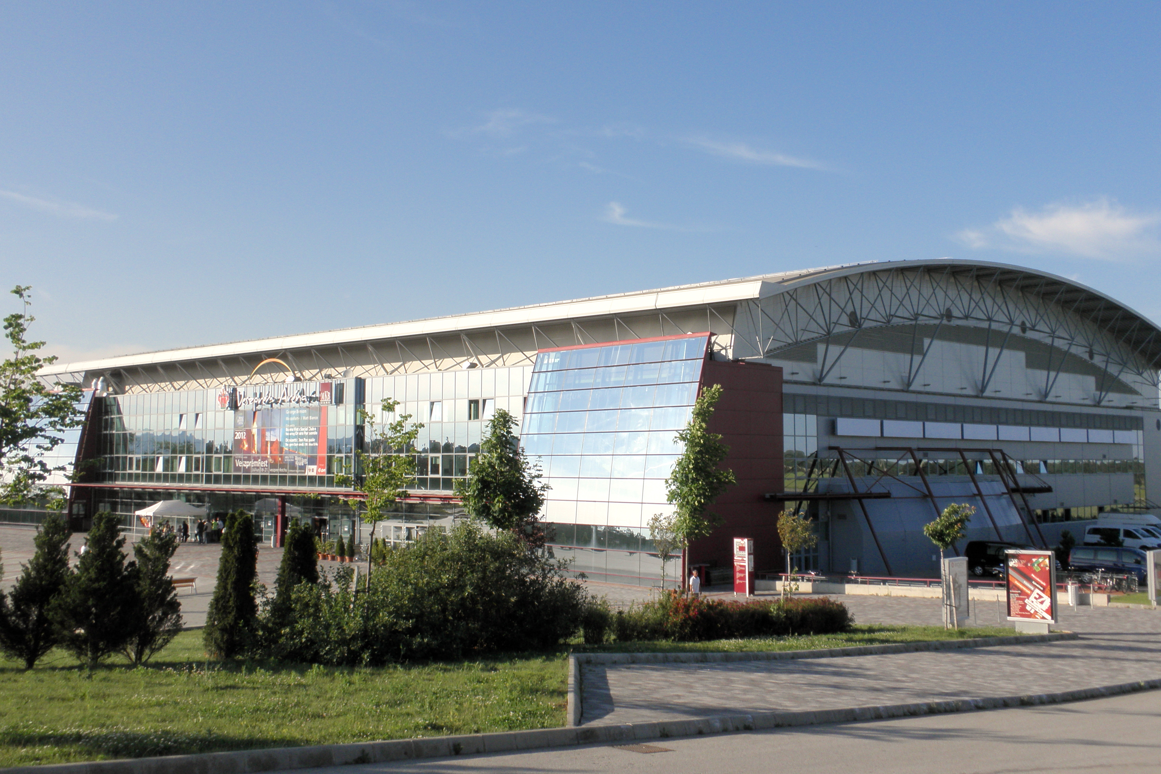 Veszprem Arena front view